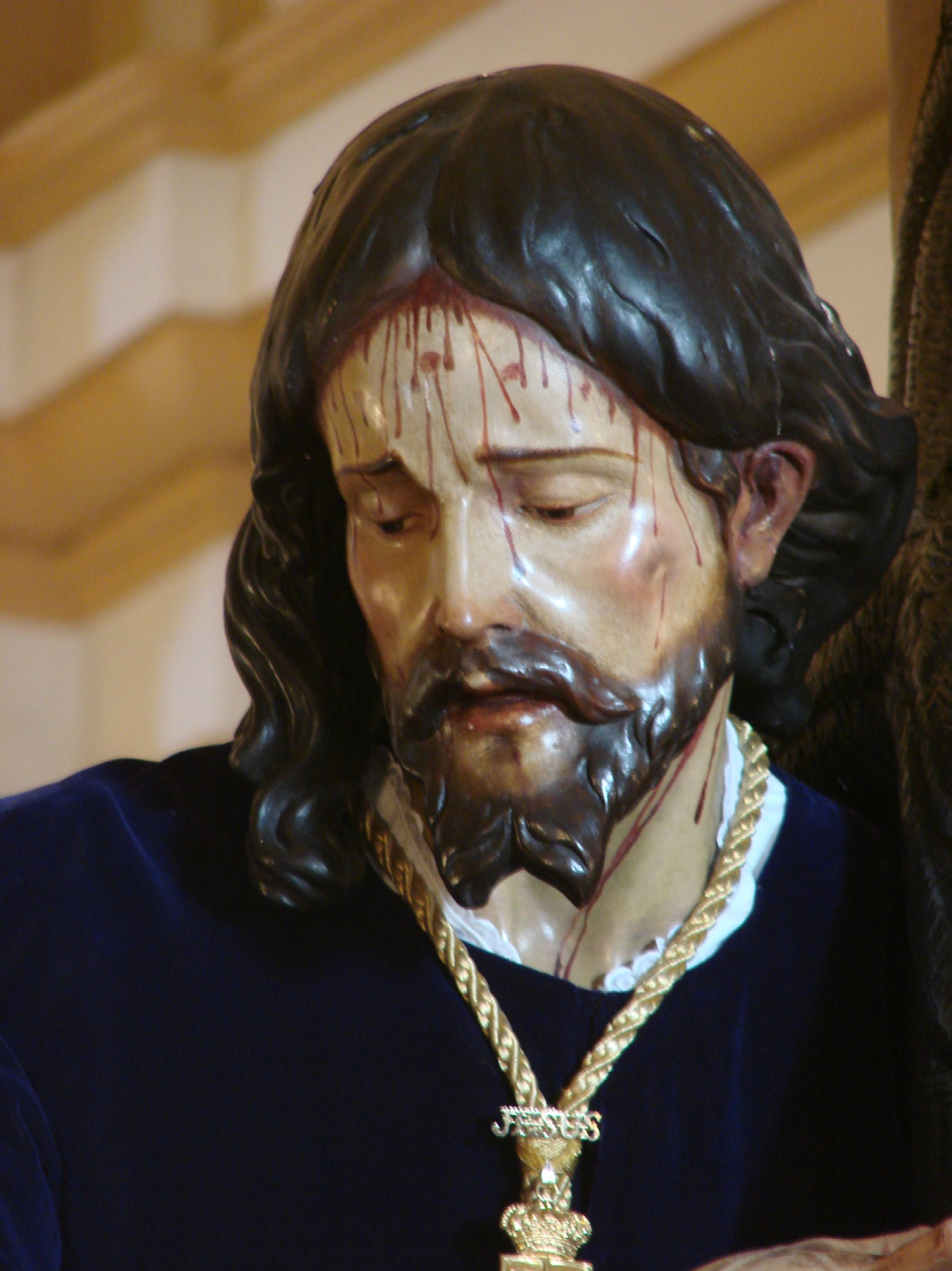 Nuestro Padre Jesus